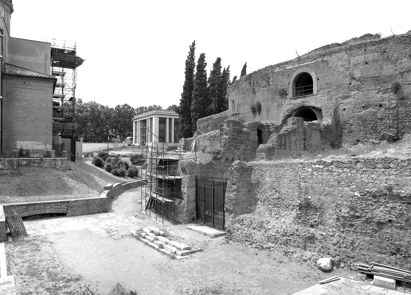 Piazza Augusto Imperatore con l'Augusteo, sullo sfondo la vecchia teca dell'Ara Pacis